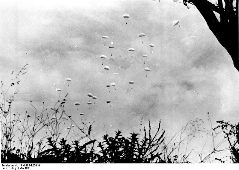 ADN/ZB, II. Weltkrieg 1939-1945 Griechenland: Faschistische deutsche Fallschirmjäger überfallen im Mai 1941 Kreta. 5546-41